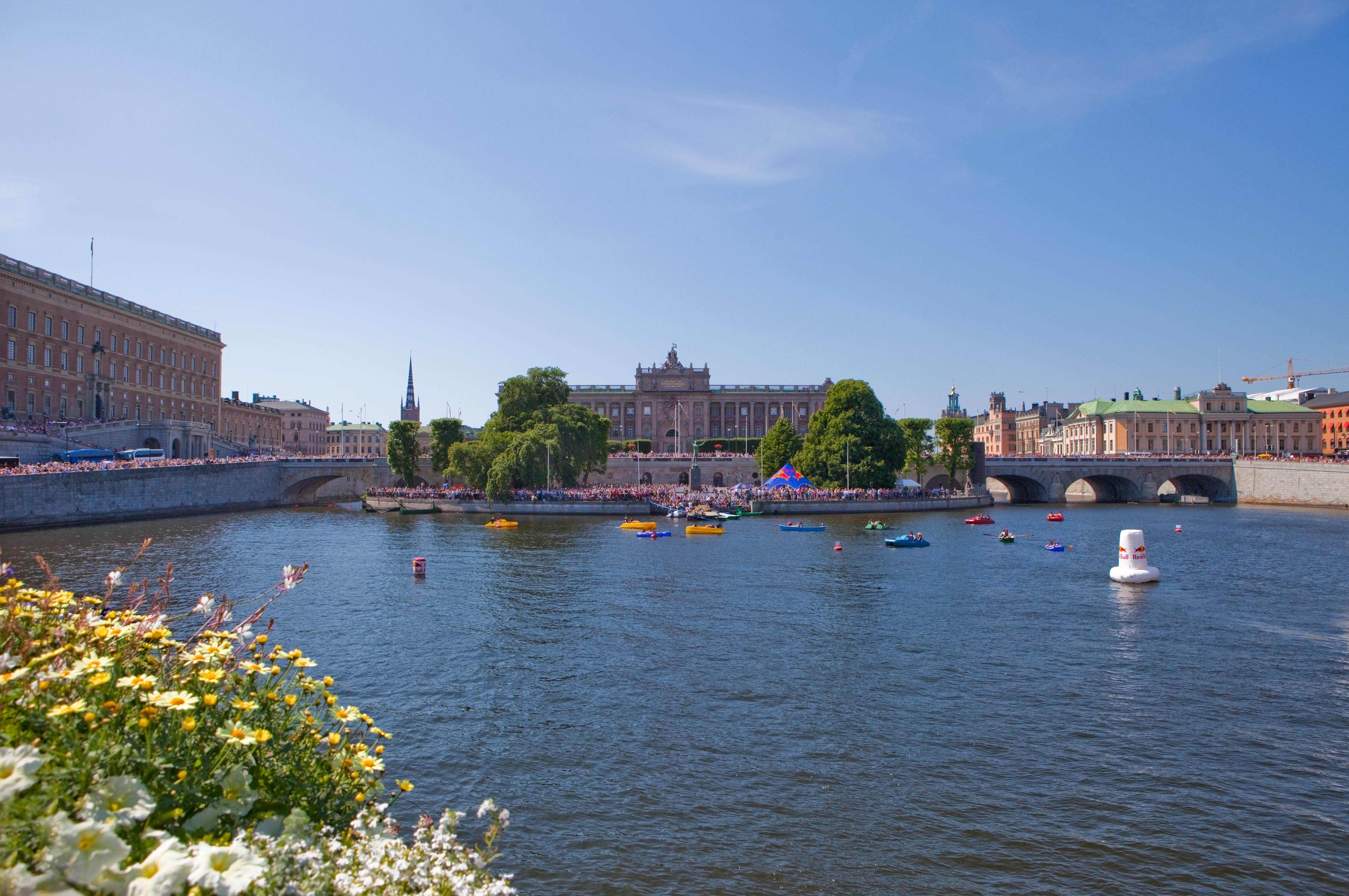 Red Bull Flugtag 2010, Strömmen, Stockholm